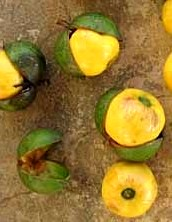 Isano, Boleko Früchte